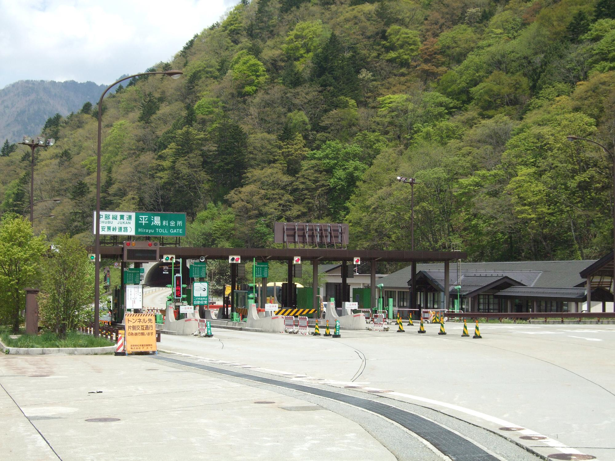 中部縦貫自動車道 安房峠道路 平湯料金所（入口） 奥に見えるのは湯ノ平トンネル